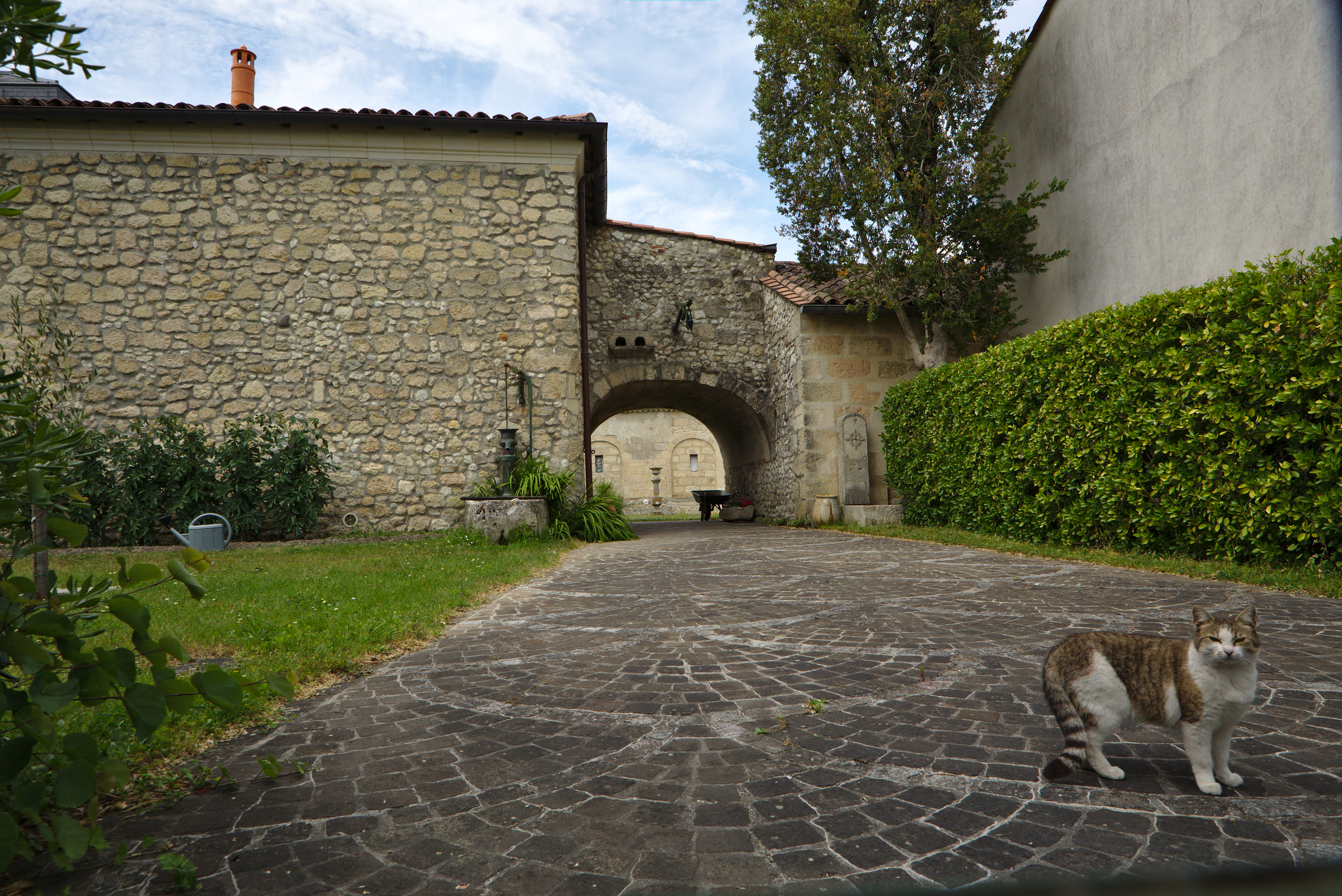 Entrée latérale du château Larruau